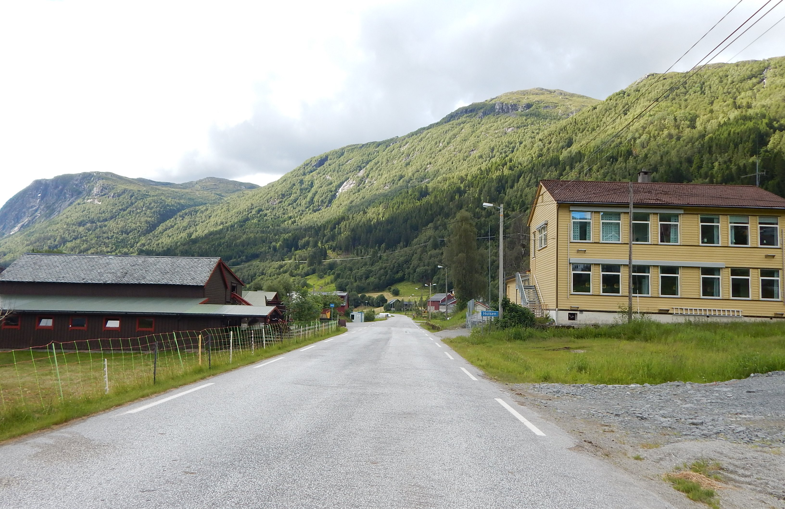 Fylkesvei 613 gjennom Holsen